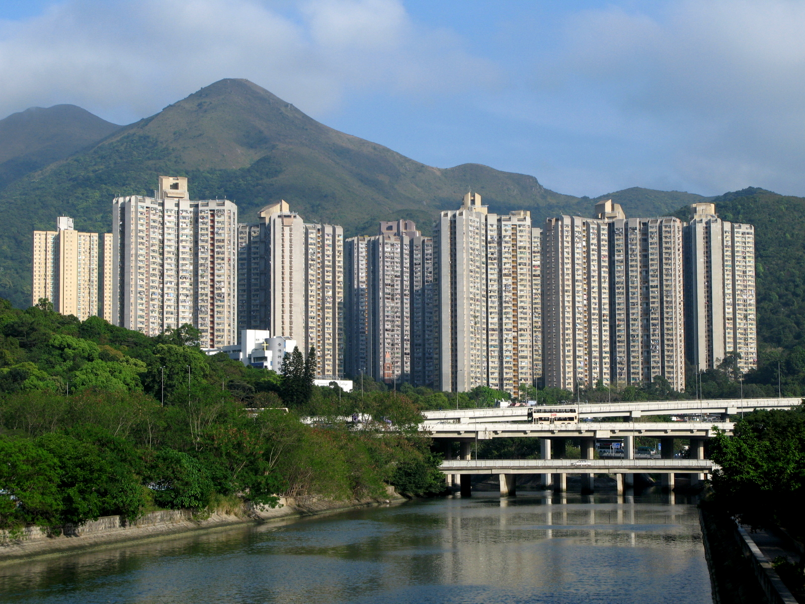 HK Kwong Yuen Estate View